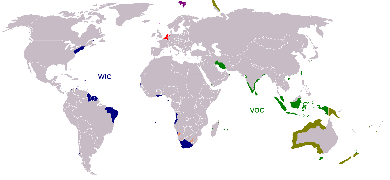 Oude kaart.